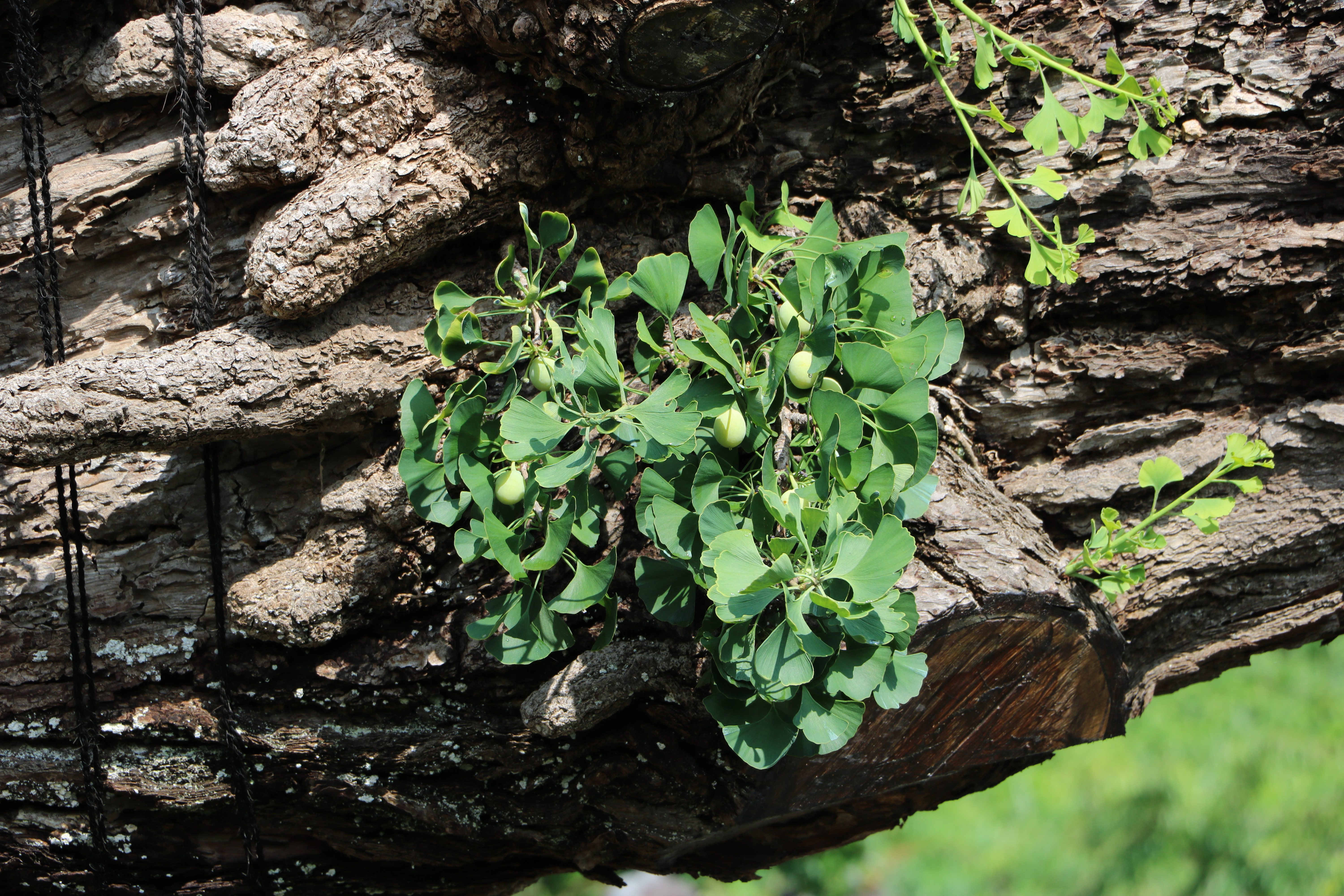 国指定天然記念物、上沢寺のオハツキイチョウの黄葉前の銀杏（山梨県南巨摩郡身延町）